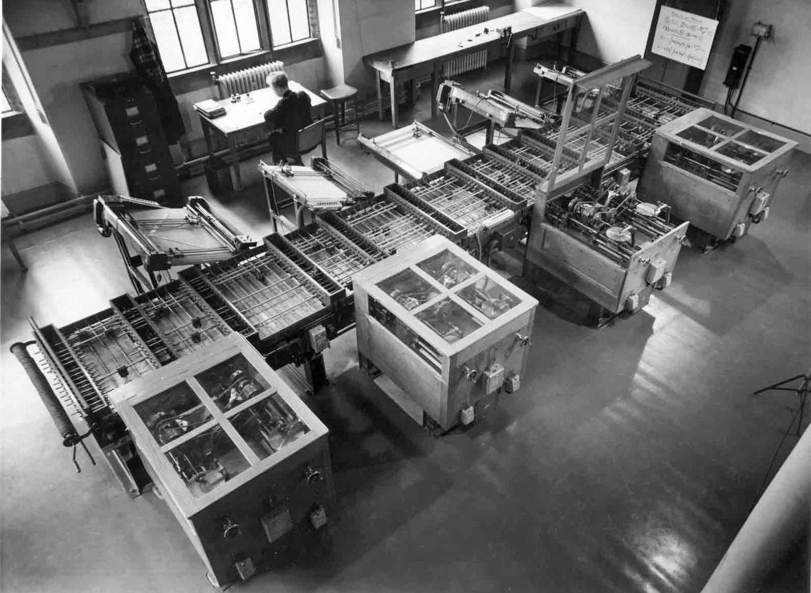 Cambridge differential analyser